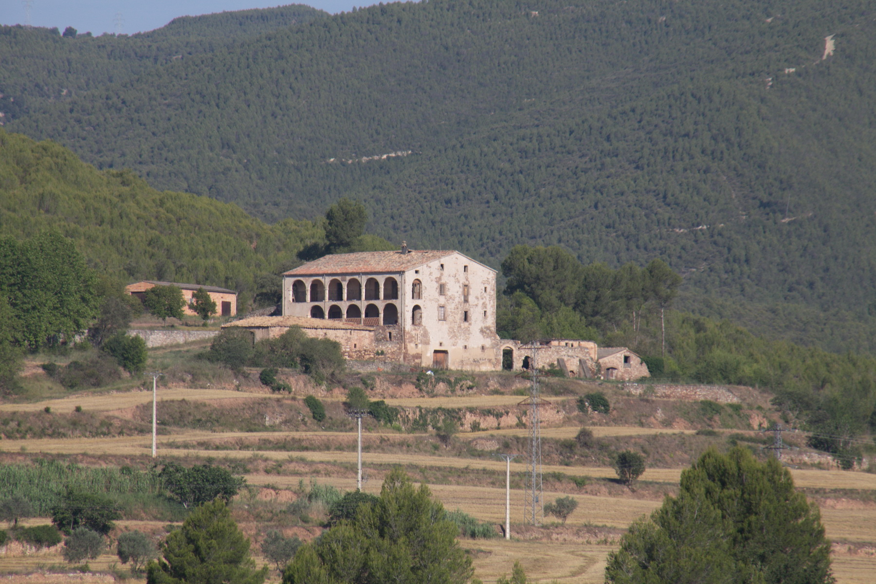 Casa pairal de l'antiga colònia industrial tèxtil d'Antius (Callús, Catalunya)